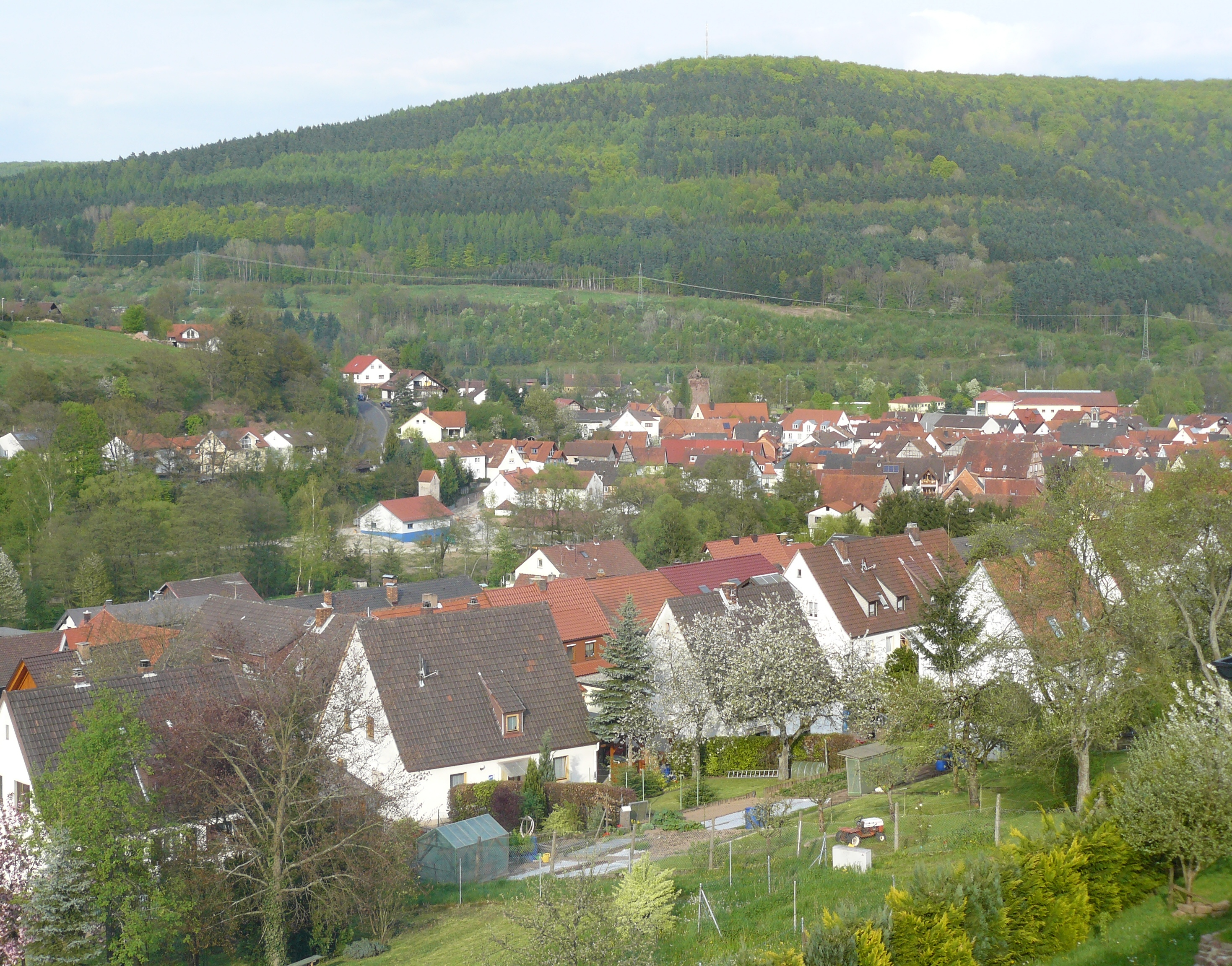 Blick über die Dächer von Burgsinn